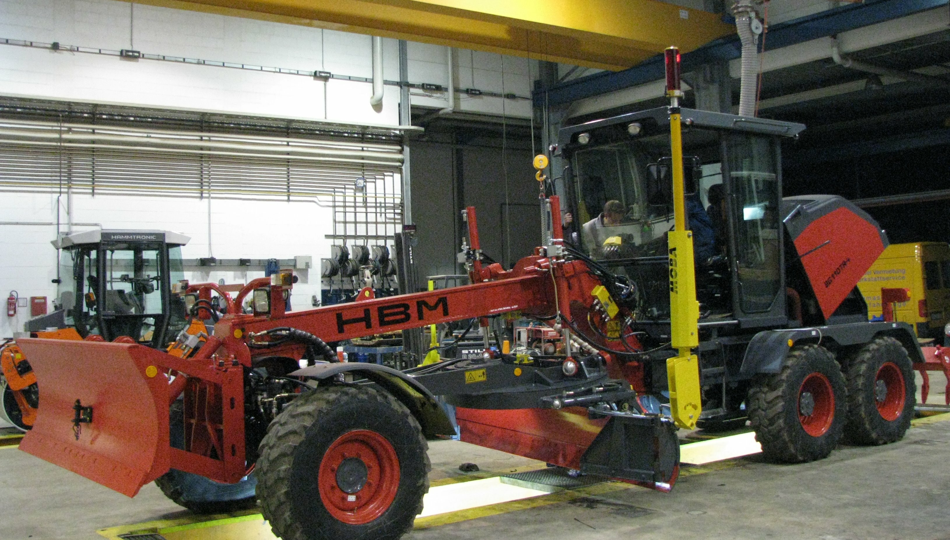 На автогрейдер фирмы HBM-Nobas устанавливается система нивелирования GS-506. Слева, на отвале, на специальной площадке, установлена мачта с пропорциональным лазерным приемником LS-3000. Этот датчик контролирует высоту отвала. Лазерный излучатель устанавливается на объекте в удобном месте, при этом LS-3000 стабильно принимает излучение передатчика в радиусе 200-300 метров. Вращающийся на 360° излучающий элемент передатчика, своим лучом создает горизонтальную или расположенную под определенным углом к горизонту плоскость. Лазерный приемник фиксирует положение отвала автогрейдера, на выбранной высоте, в каждой точке созданного поля. Действие лазерных излучателей, применяемых с системой нивелирования GS-506, абсолютно безвредно. Наибольший эффект от применения GS-506 с лазерным приемником достигается при использовании автогрейдера на строительных площадках большой площади.